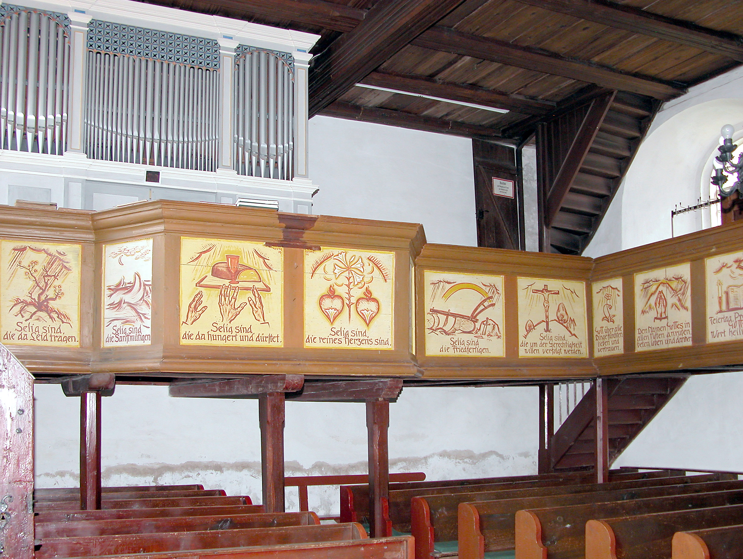 19.06.2006 01465 Schönborn (Dresden), Zum Seifersdorfer Tal (GMP: 51.148143,13.866957): Dorfkirche, Ursprünge in einer romanischen Kapelle aus der Mitte des 13. Jahrhunderts. Nach der Zerstörung 1653 wurde sie bis 1664 wieder aufgebaut. Die Orgel auf der Westempore wurde 1860 mit einem spätklassizistischen Prospekt versehen. [DSCN10418.TIF]20060619035DR.JPG(c)Blobelt